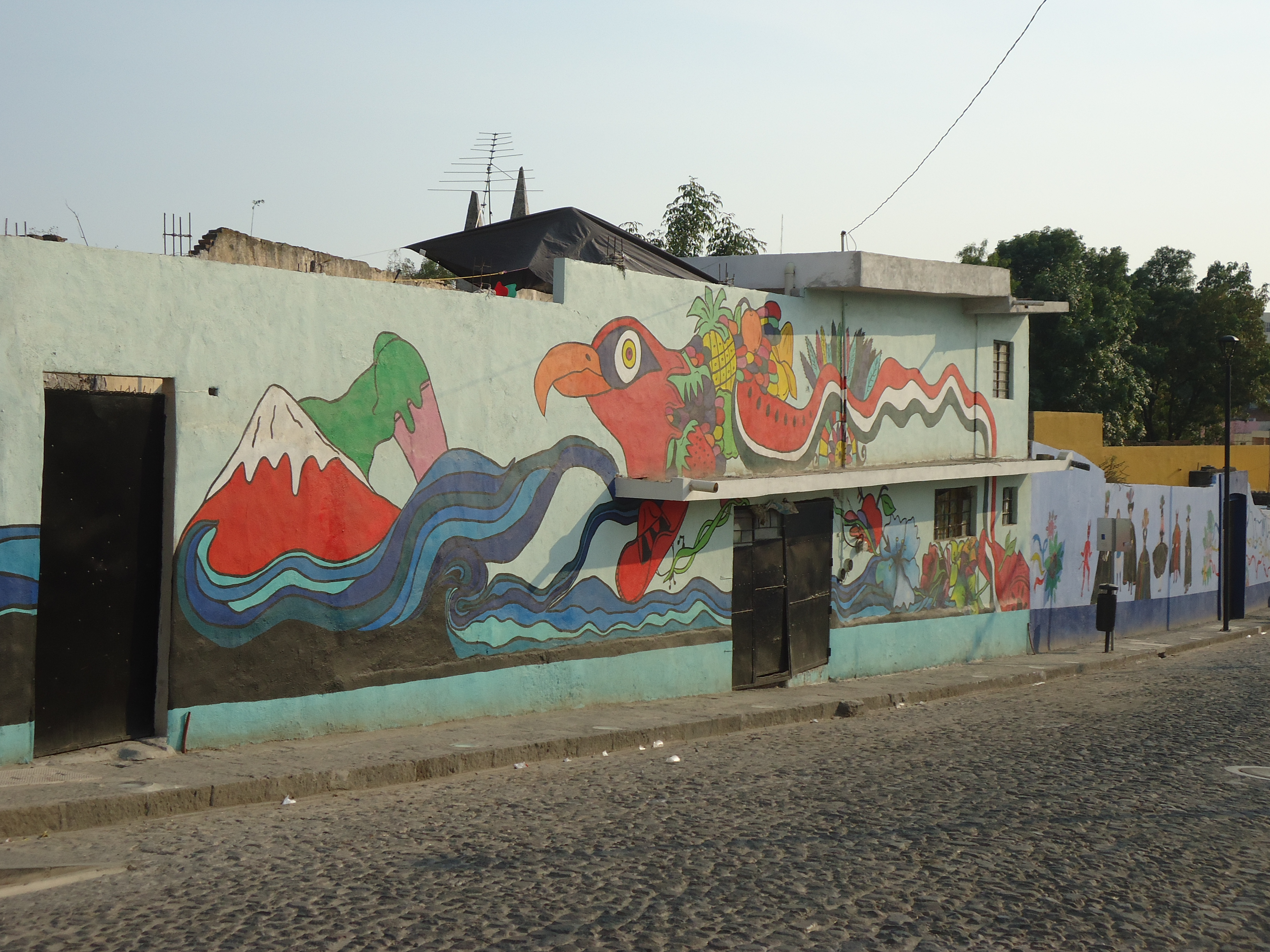 Pieza del proyecto "Puebla Ciudad Mural" impulsado por el Colectivo Tomate en el Barrio de Xanenetla, en el Centro de Puebla, Mexico.